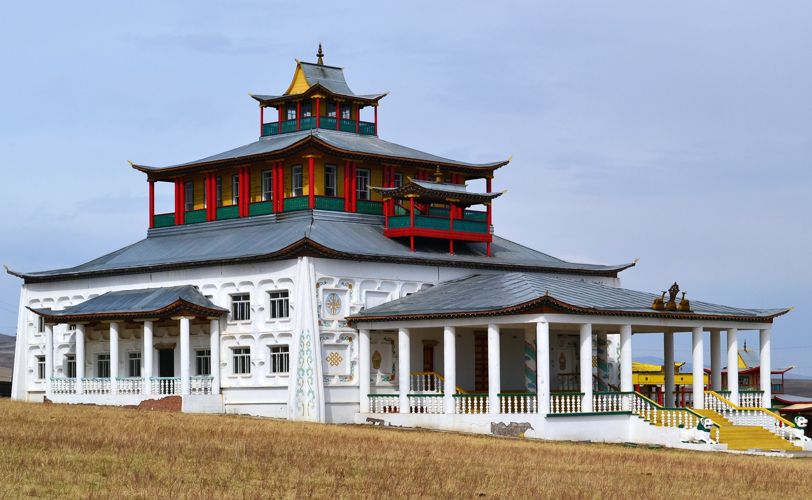 Сартул-Гэгэтуйский дацан, село Гэгэтуй, Джидинский район, Республика Бурятия